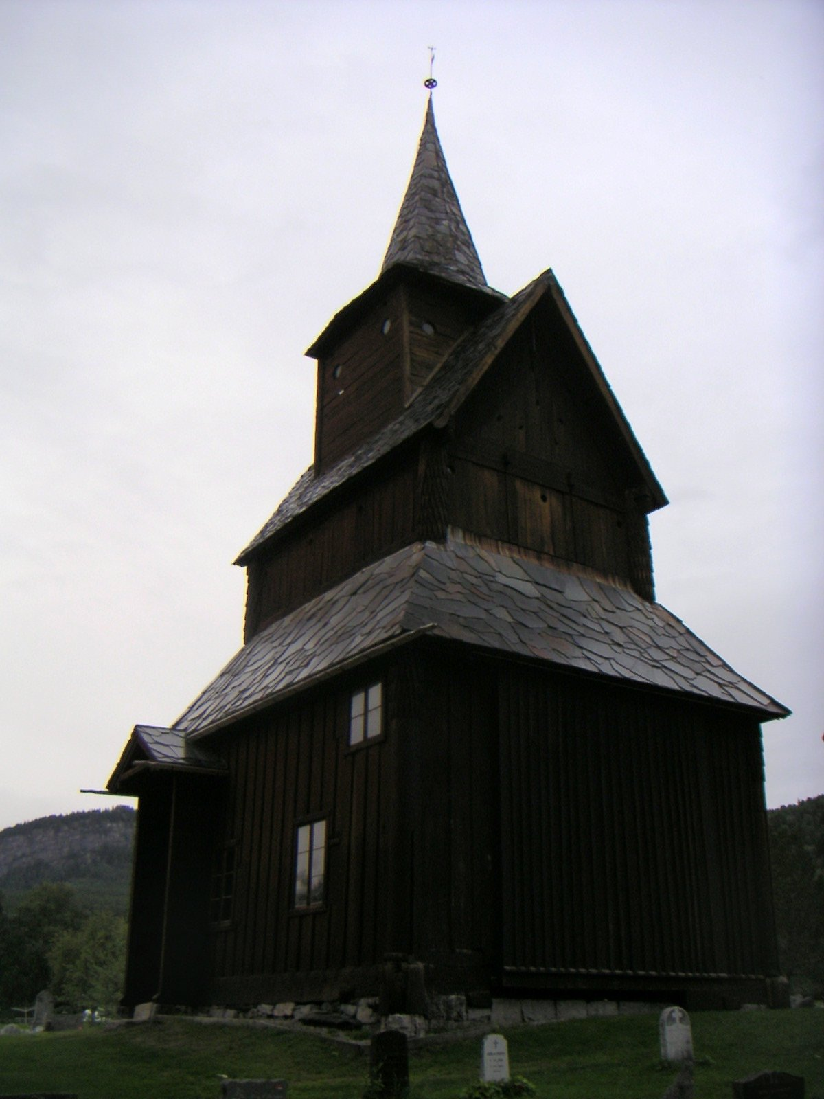 Torpo Stavkyrkje, Hallingdal